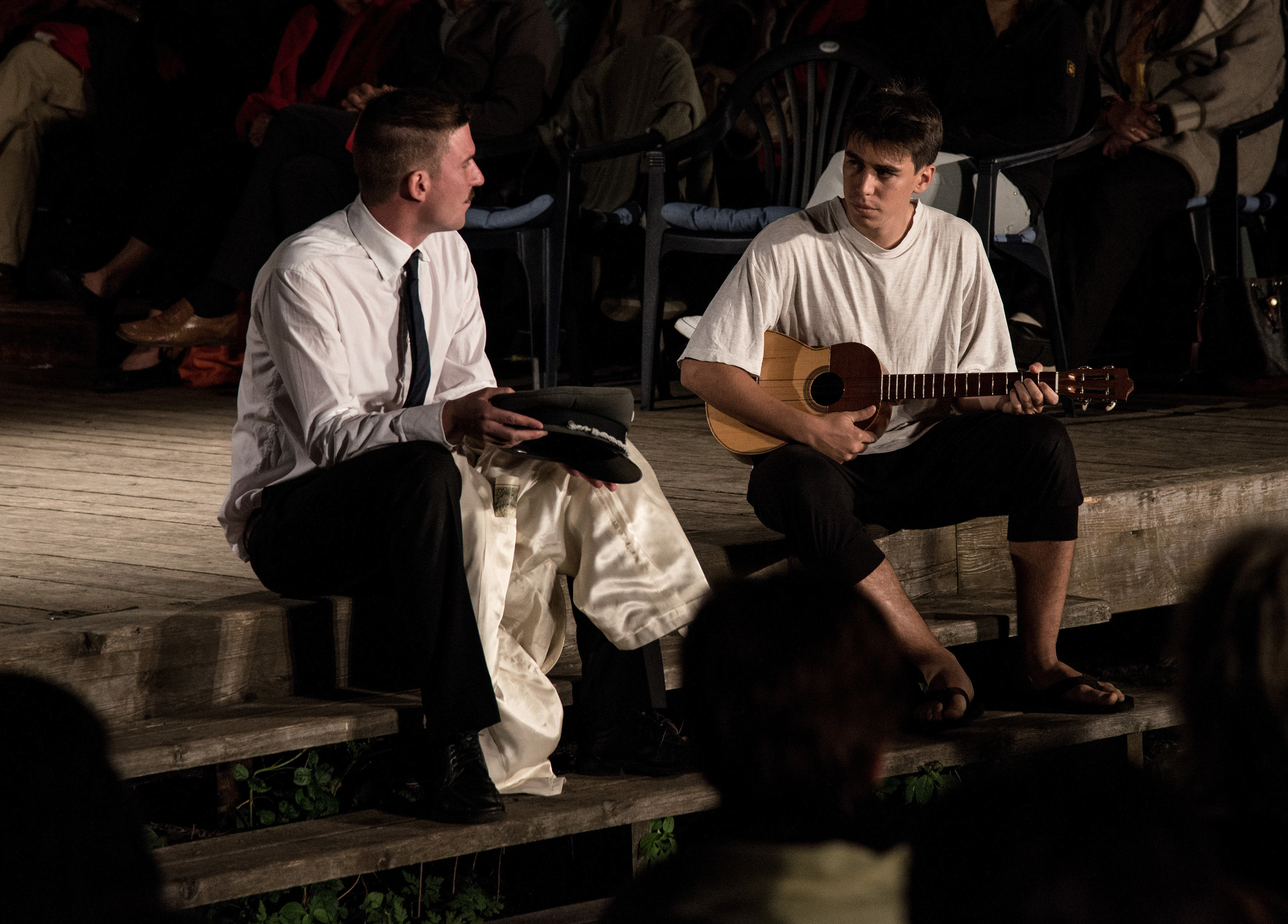 Julius Caesar by William Shakespeare performed at Shakespeare in Styria 2014, with Peter Pausz (as Brutus) and Henry Jiménez (as Lucius)